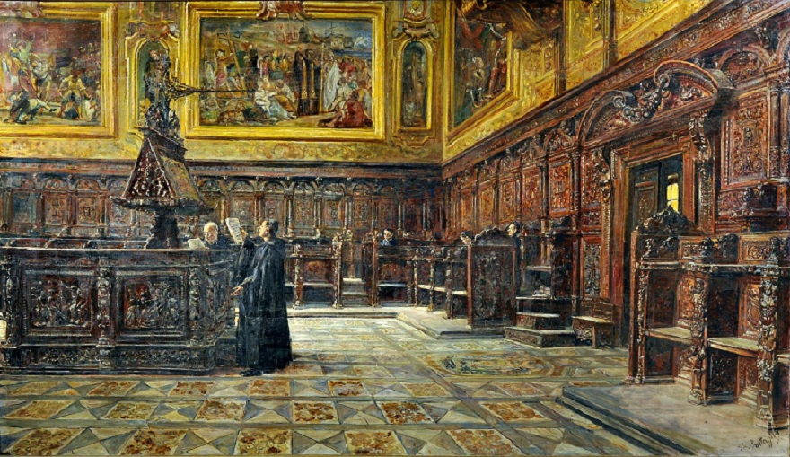 "Coro di chiesa", olio su tela, 97 x 171 cm., firmato